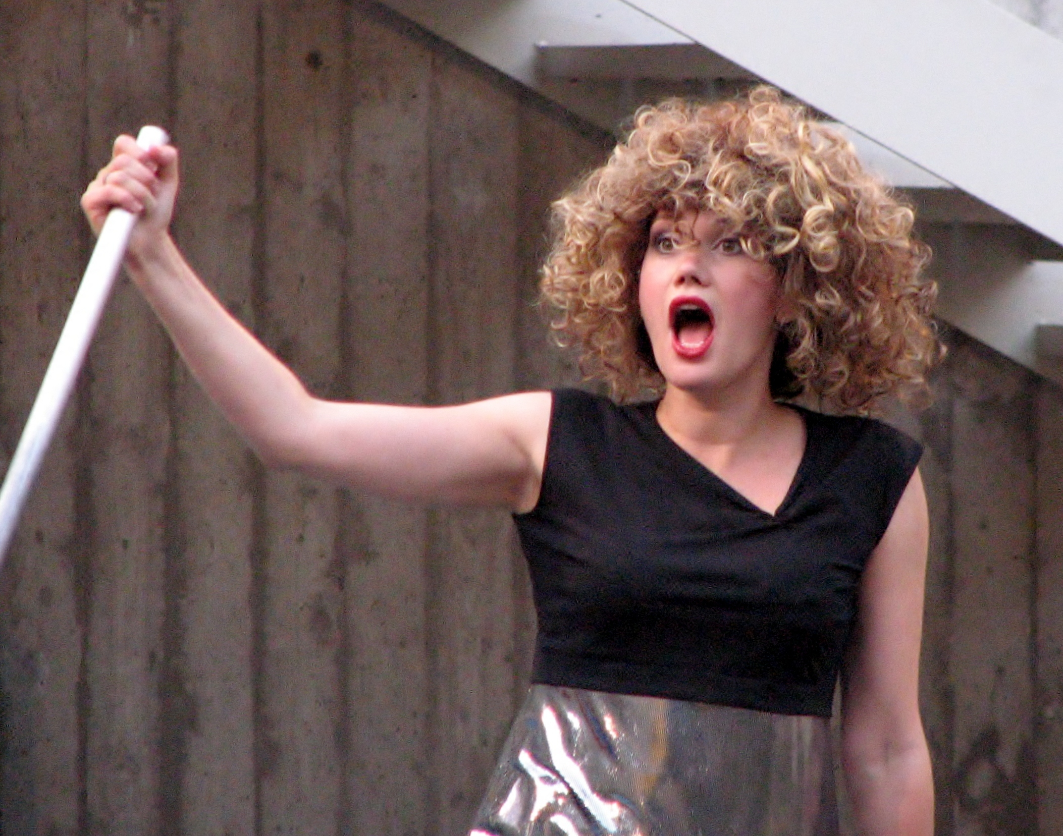 Elisabet Reinsalu Tallinna Linnateatri 48. hooaja avamisel